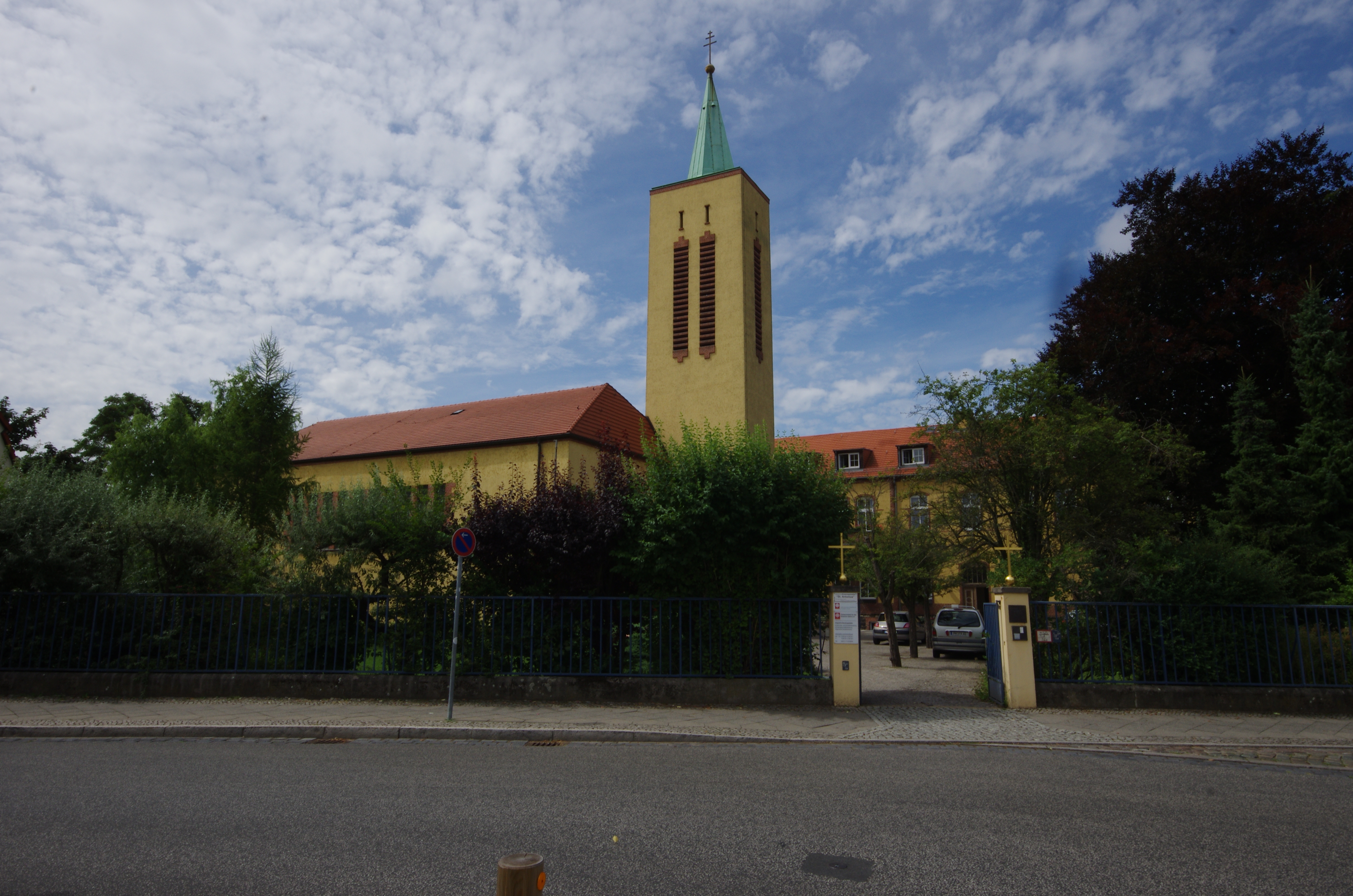 Potsdam in Brandenburg. Das Haus in der Straße Plantagenstraße 23 steht unter Denkmalschutz.